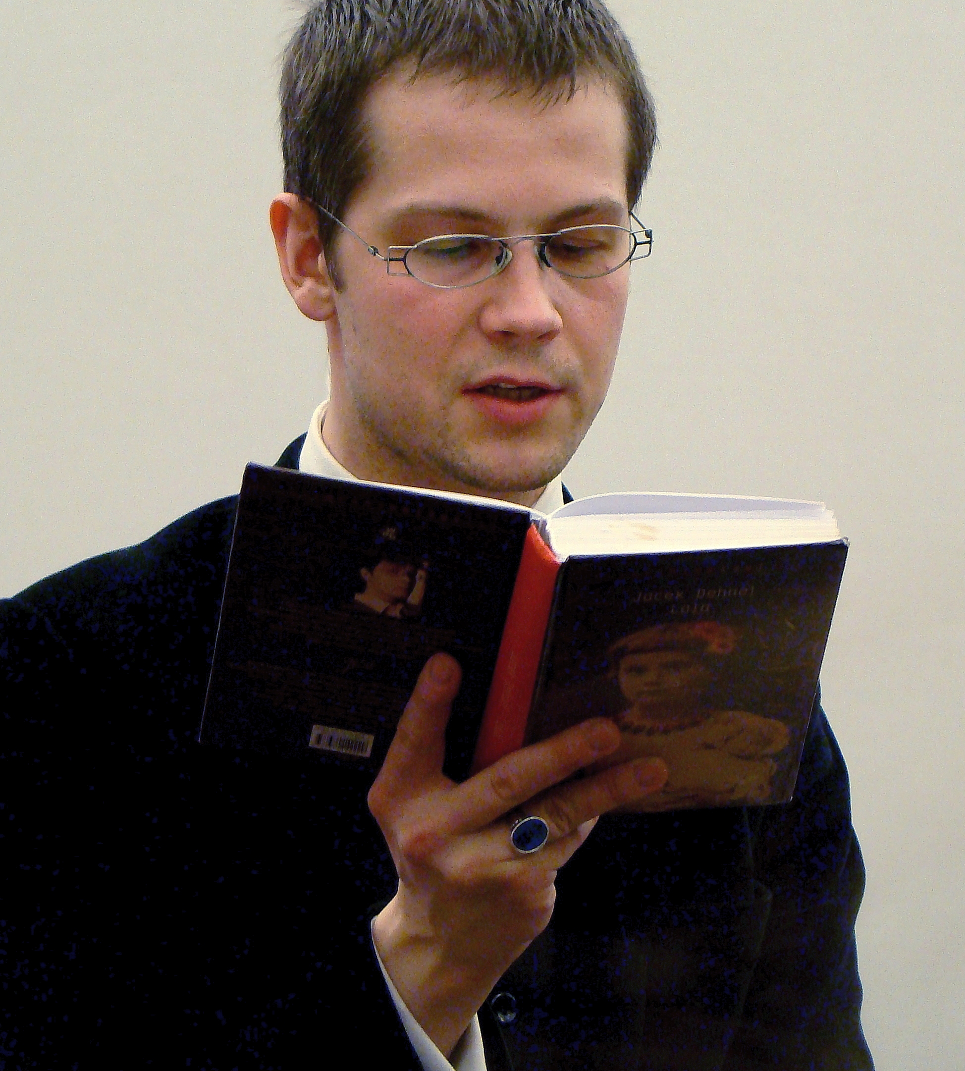 Jacek Dehnel